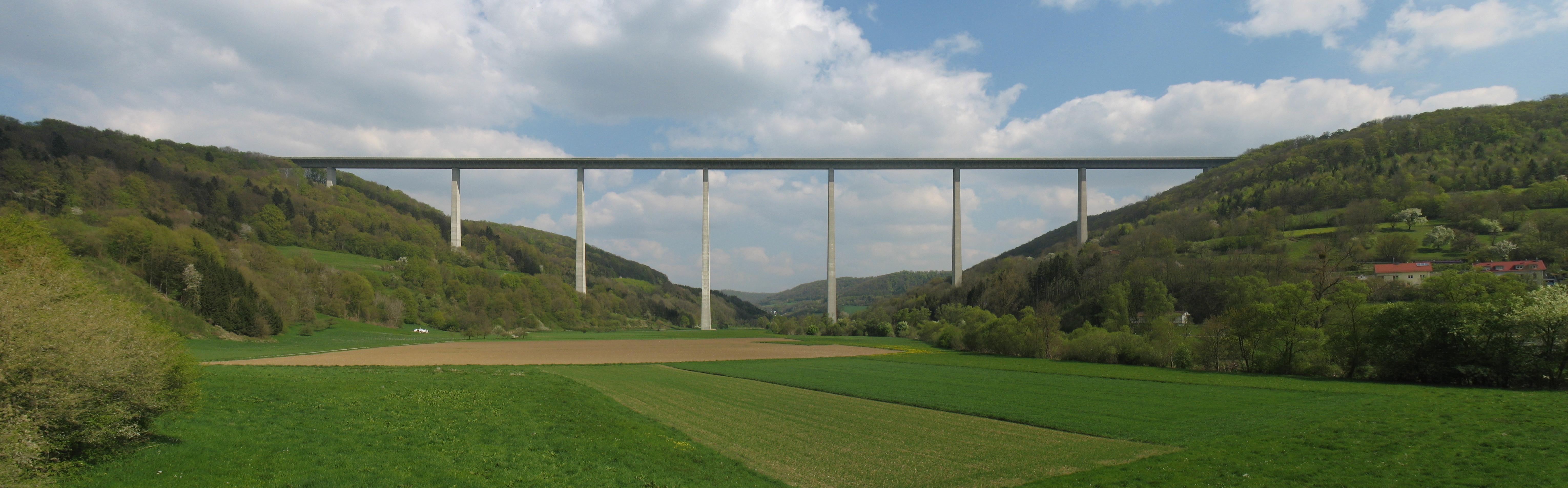 Kochertalbrücke der Autobahn A6 bei Geislingen, Ortsteil von Braunsbach.